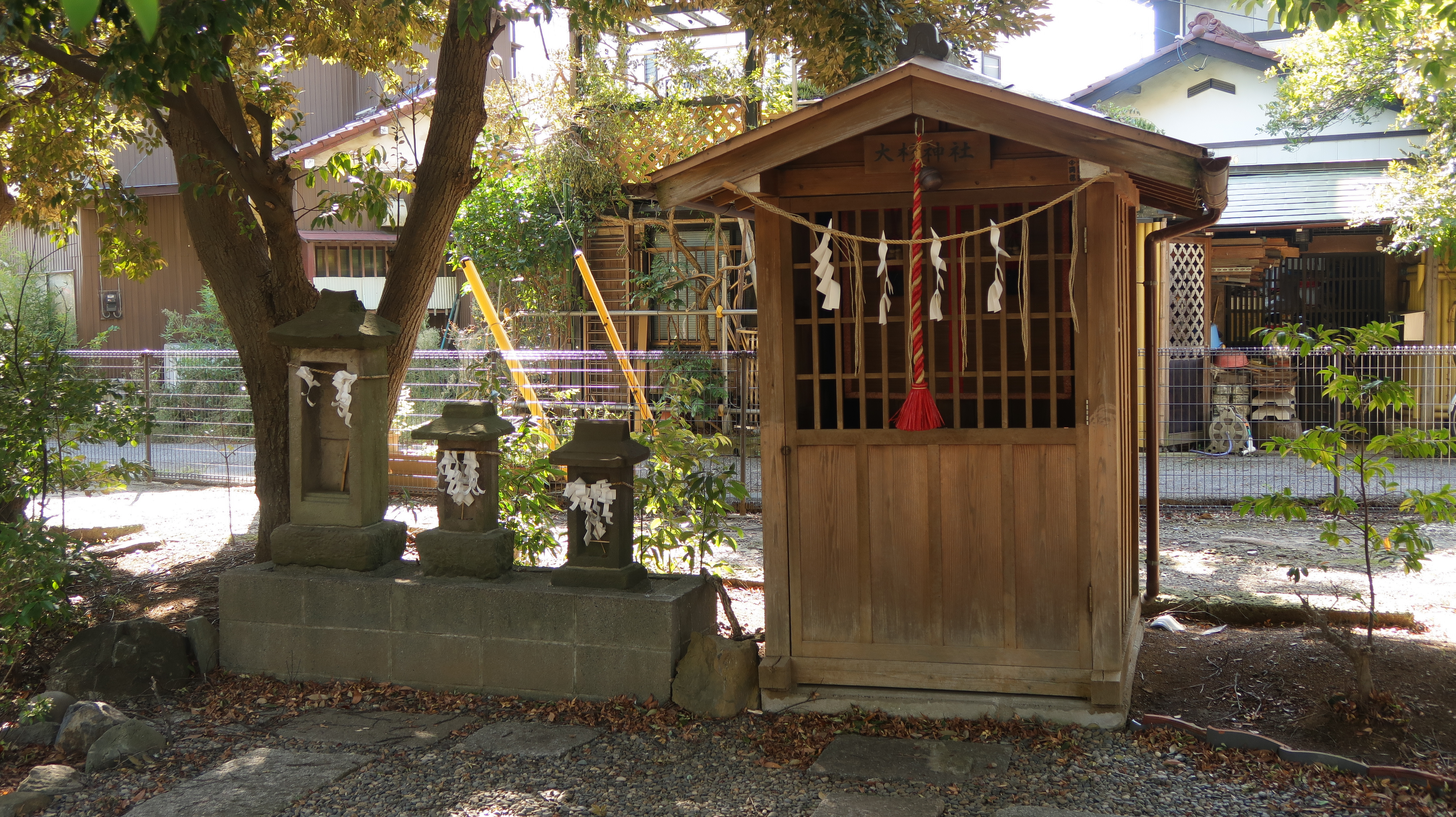 菊田神社（千葉県習志野市津田沼）